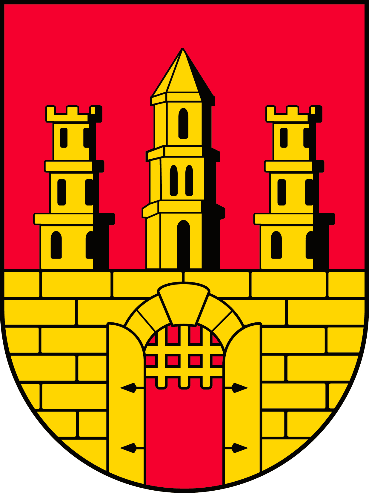 Neues Stadtwappen von Bruck an der Leitha seit 15.6.2010.